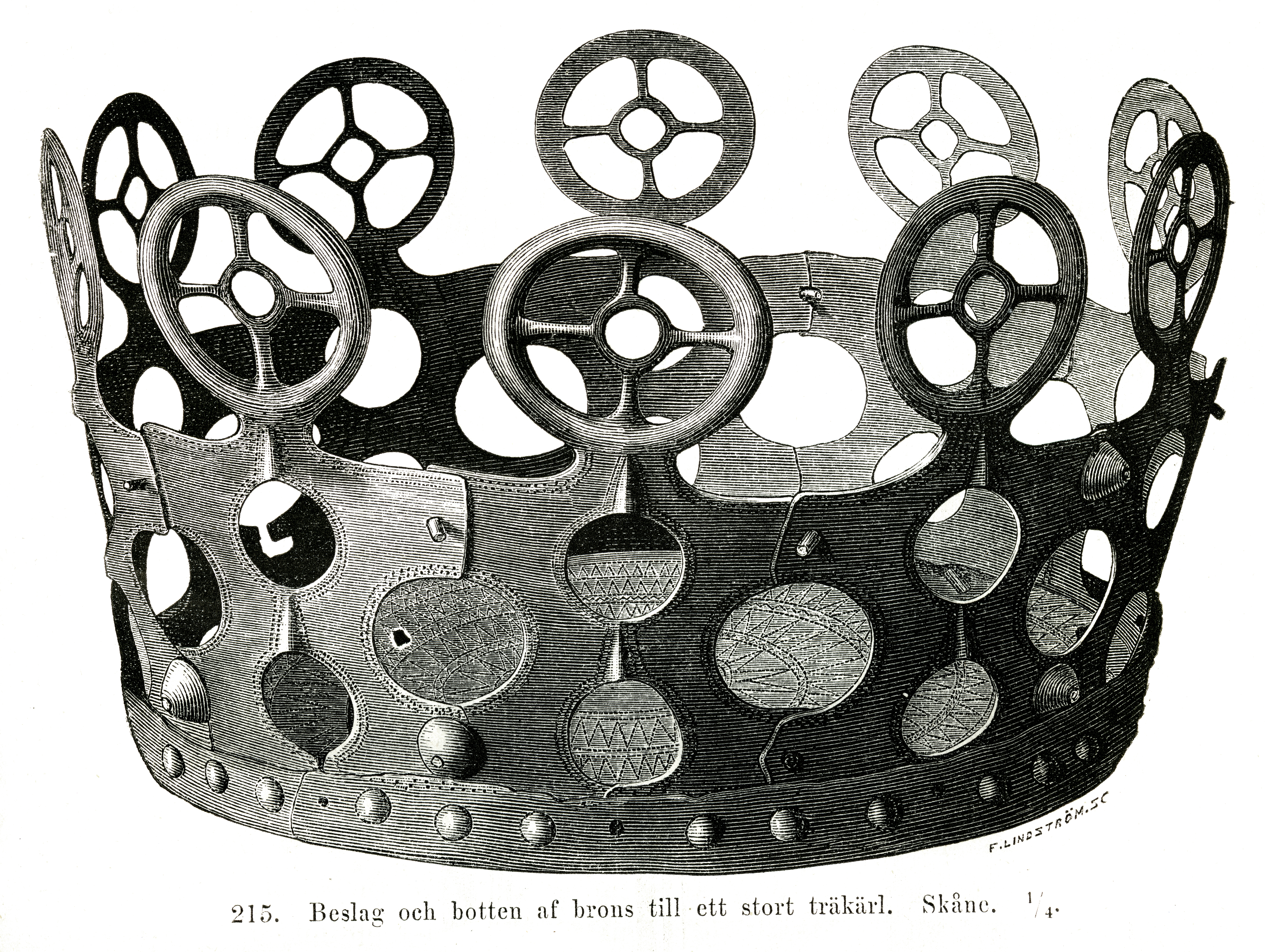 Balkåkragongen är ett kultföremål i brons och det hittades 1847 i en torvmosse vid Balkåkra by, Balkåkra socken, Ljunits härad, Ystads kommun, Skåne, Sverige. Kultföremålet brukar tolkas som en trumma av brons, vilket instrumentaltekniskt innebär att den är en gong. Föremålet dateras till bronsålderns Period II (1500-1300 f.Kr.). Ett likadant föremål hittades år 1914 i Hasfalva i dåvarande Ungern (senare Haschendorf i Österrike). Balkåkragongen inköptes 1848 till Statens Historiska Museum i Stockholm och har där inventarienummer SHM 1461. Bilden är figur 215 på sidan 151 i Sveriges hednatid, samt medeltid (1877) av Oscar Montelius. Bildtexten lyder där: "215. Beslag och botten af brons till ett stort träkärl. Skåne.1/4."